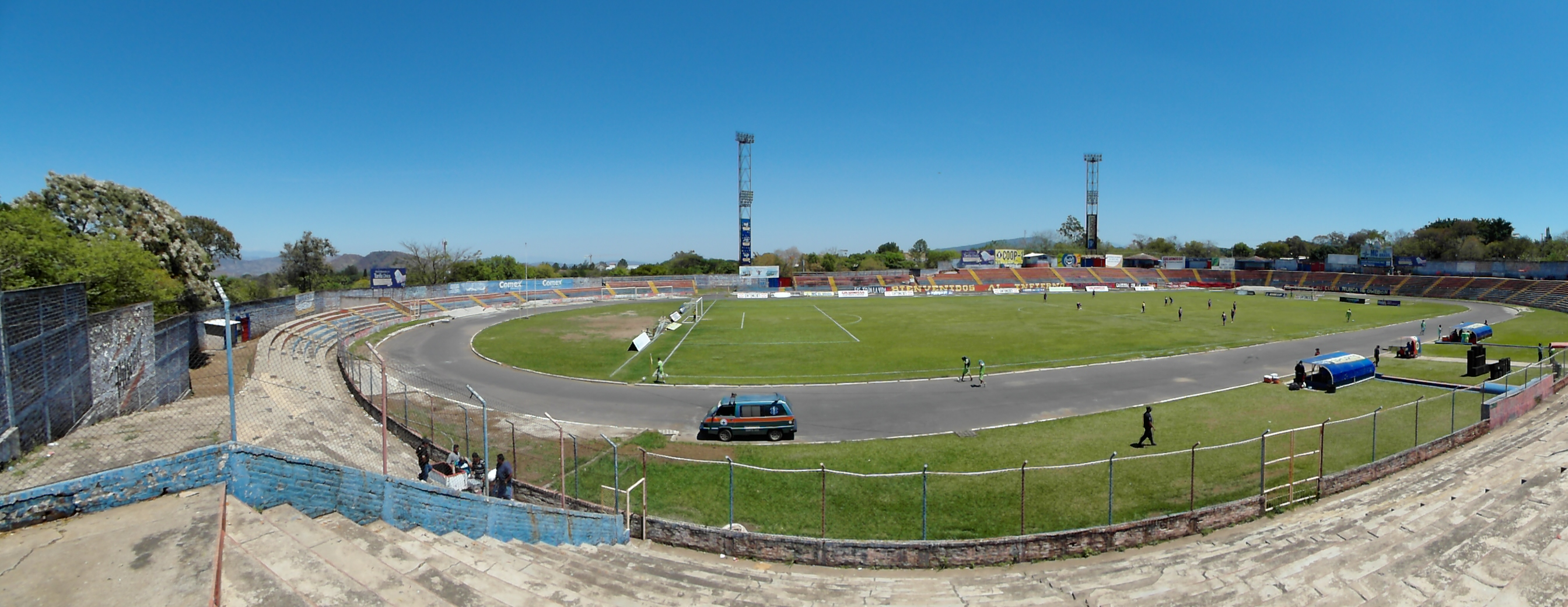 Panoramica del Estadio Santaneco